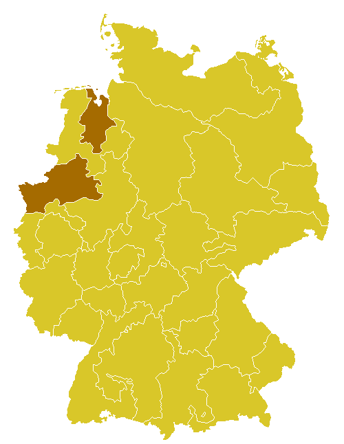 Beschreibung, Quelle und Lizenz Beschreibung: Katholische Diözese/Bistum in Deutschland Quelle: selbst erstellt (Nach Vorlage von ) Autor: Benutzer:WikiNight